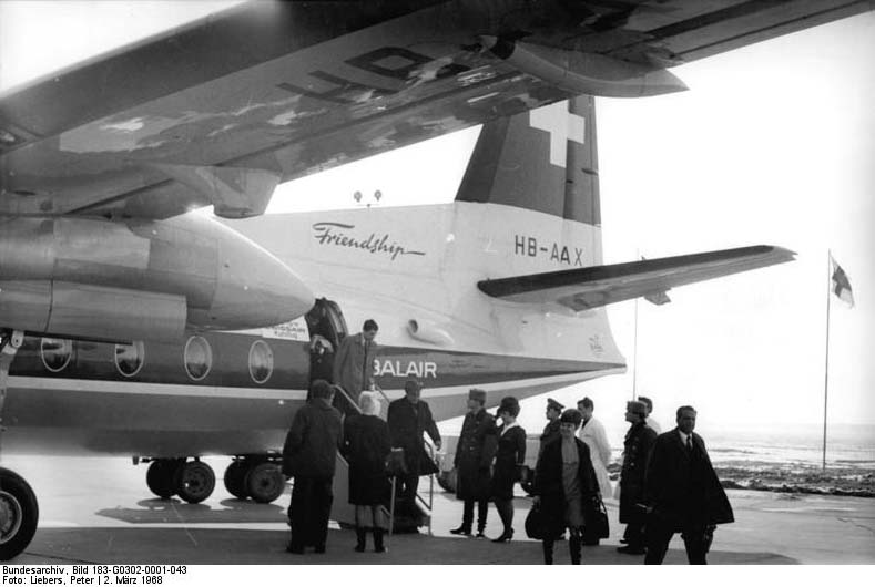 Leipzig, Flughafen, Flugzeug, Passagiere Zentralbild Liebers bau 2.3.1968 Leipziger Frühjahrsmesse 1968 Zu den ersten ausländischen Maschinen, die am 2.3.1968 den Messeflughafen Schkeuditz anflogen, gehörte auch eine Fokker Friendship F27 der Swissair.